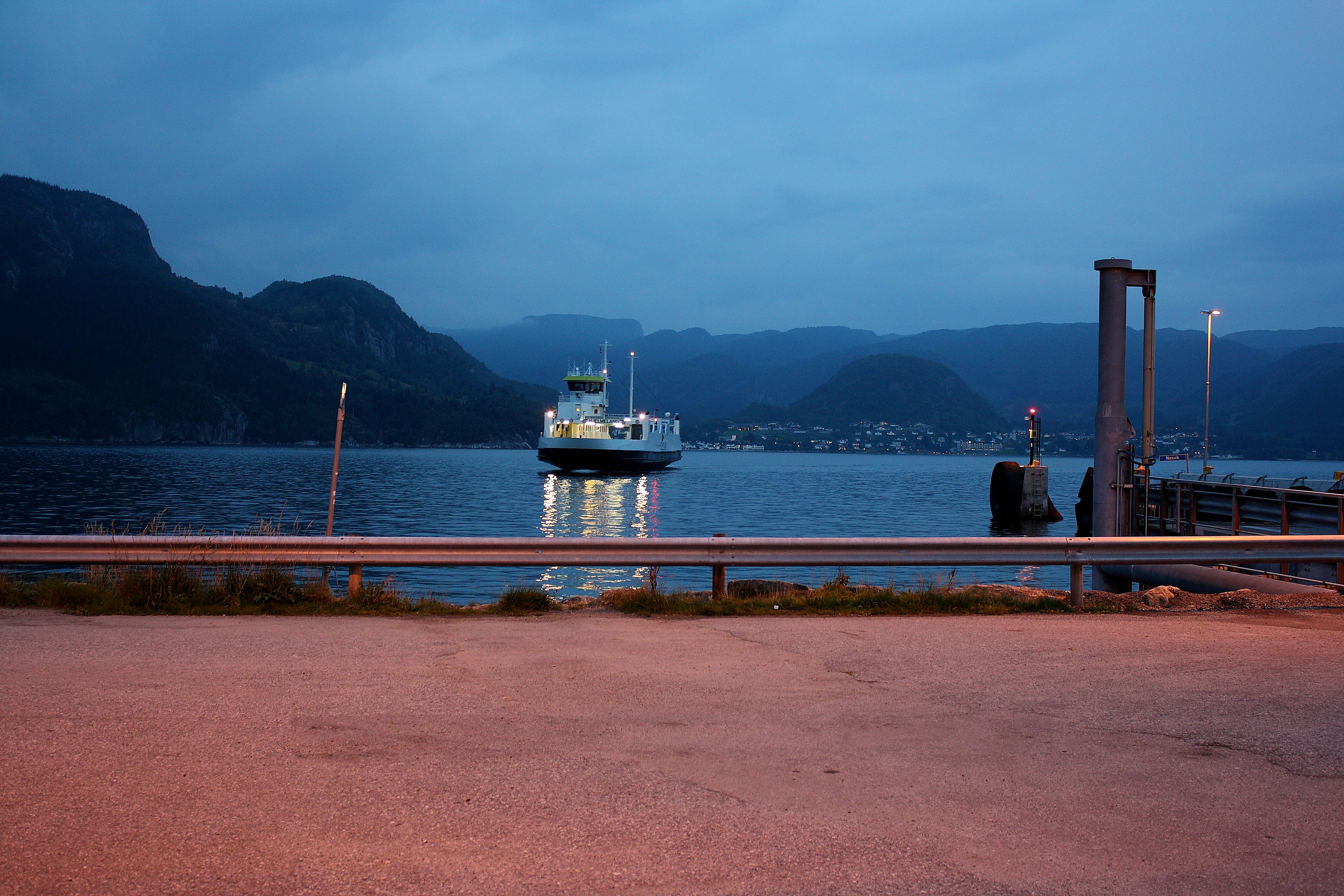 MF Hjelmeland. Tettstaden Hjelmelandsvågen i bakgrunnen. Fotografen er på kaien i Nesvik og ferja kjem frå Ombo.